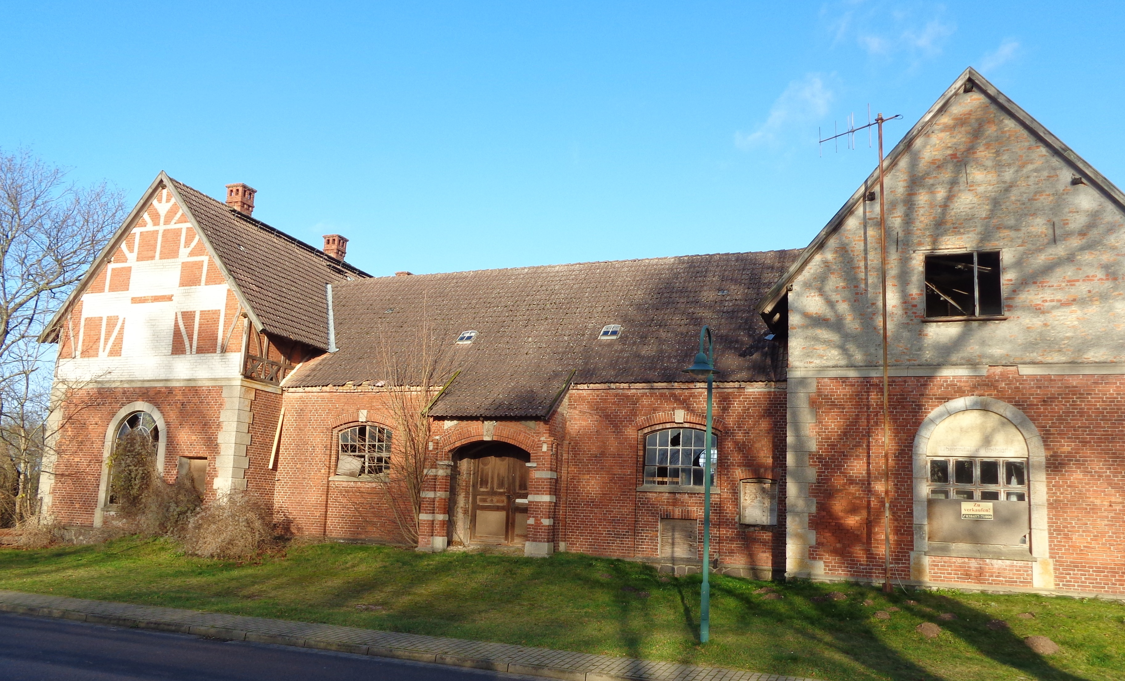 Ehemaliger Marstall von Schloss Dobbin.